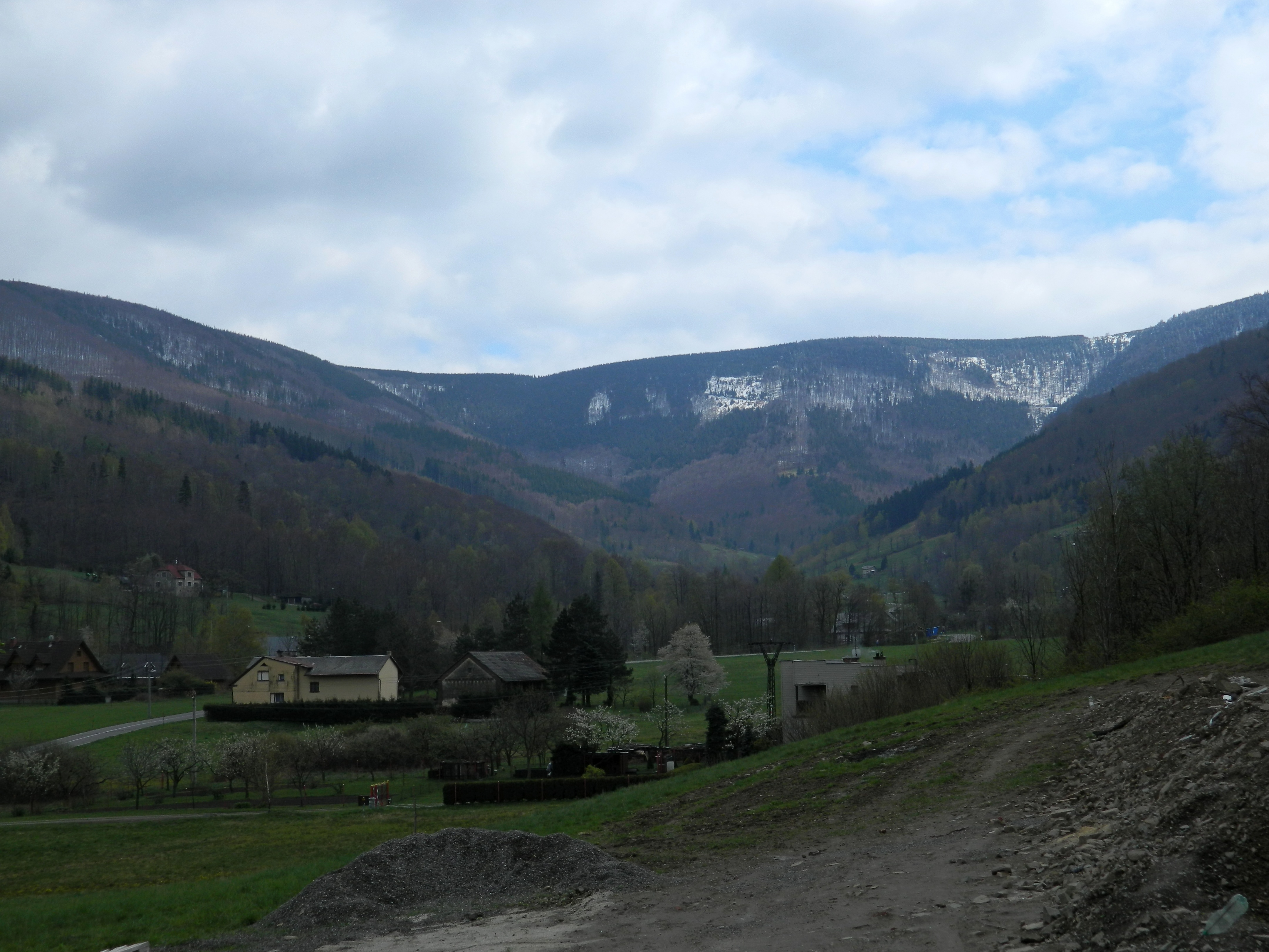 Pohled z obce Řeka na masiv Šindelné v Moravskoslezských Beskydech